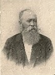 Josef Schlesinger (1831 - 1901), Rakouský matematik, filozof a politik původem z Moravy .